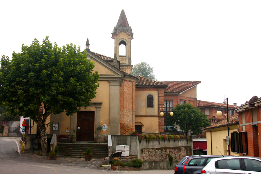 La chiesa di San Donato a Barbaresco (CN) che ospita l'enoteca regionale del vino Barbaresco DOCG